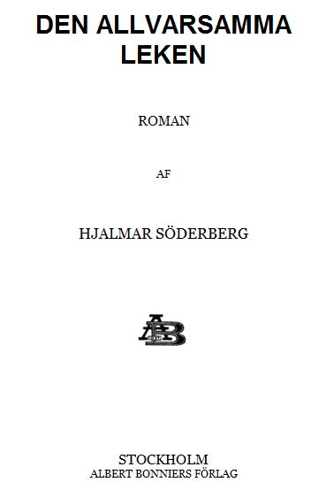 Försättsblad